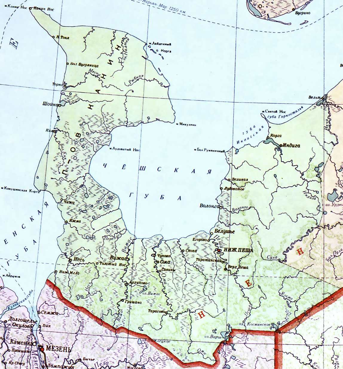 Карта Канино-Тиманского района